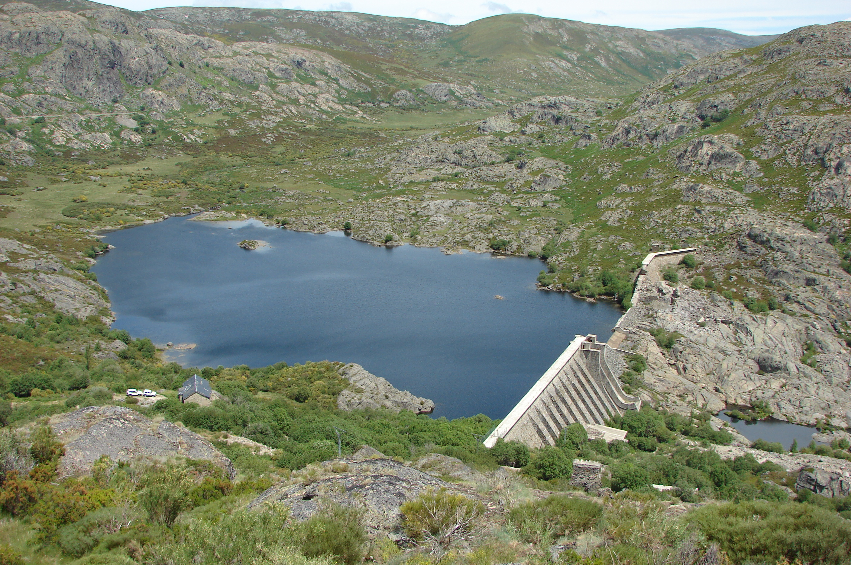 Panorámica del Embalse de Vega de Tera (Presa Rota)